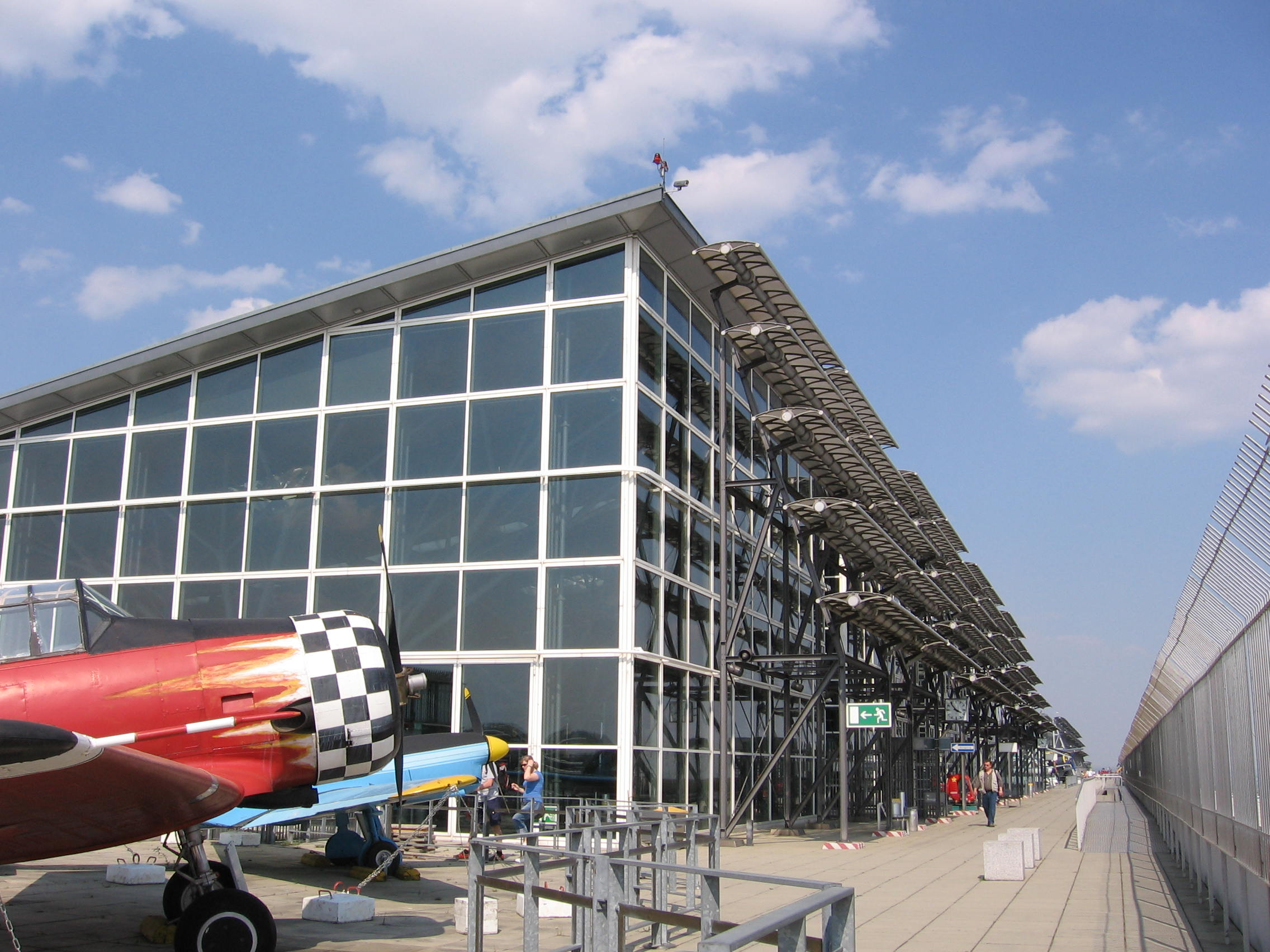 EDDS-Flughafen Stuttgart: Aussichtsterrasse über Terminal 1-3